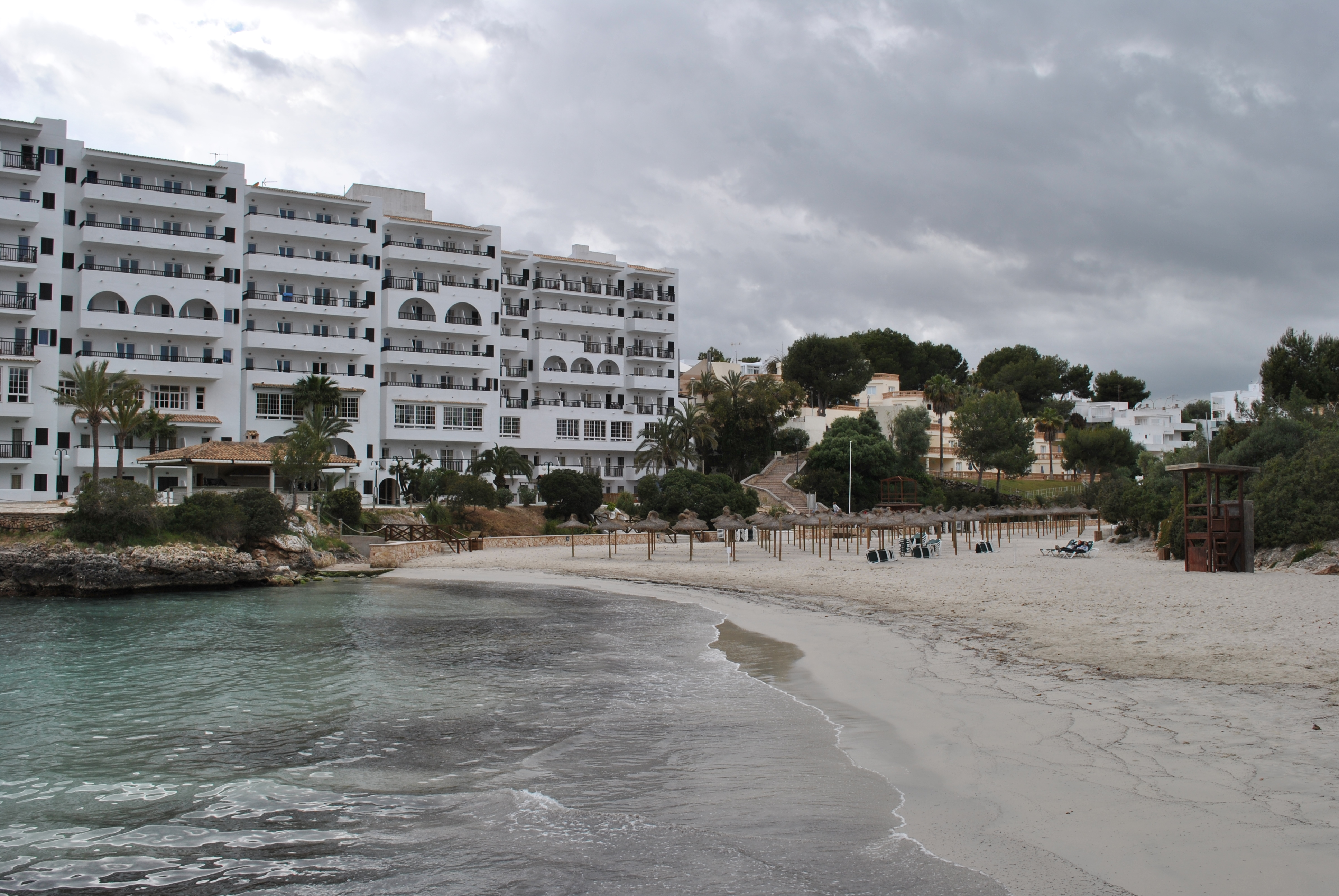 Cala Ferrera (Felanitx) This is a a photo of a beach in the Balearic Islands, Spain, with id: PL-IB-20008